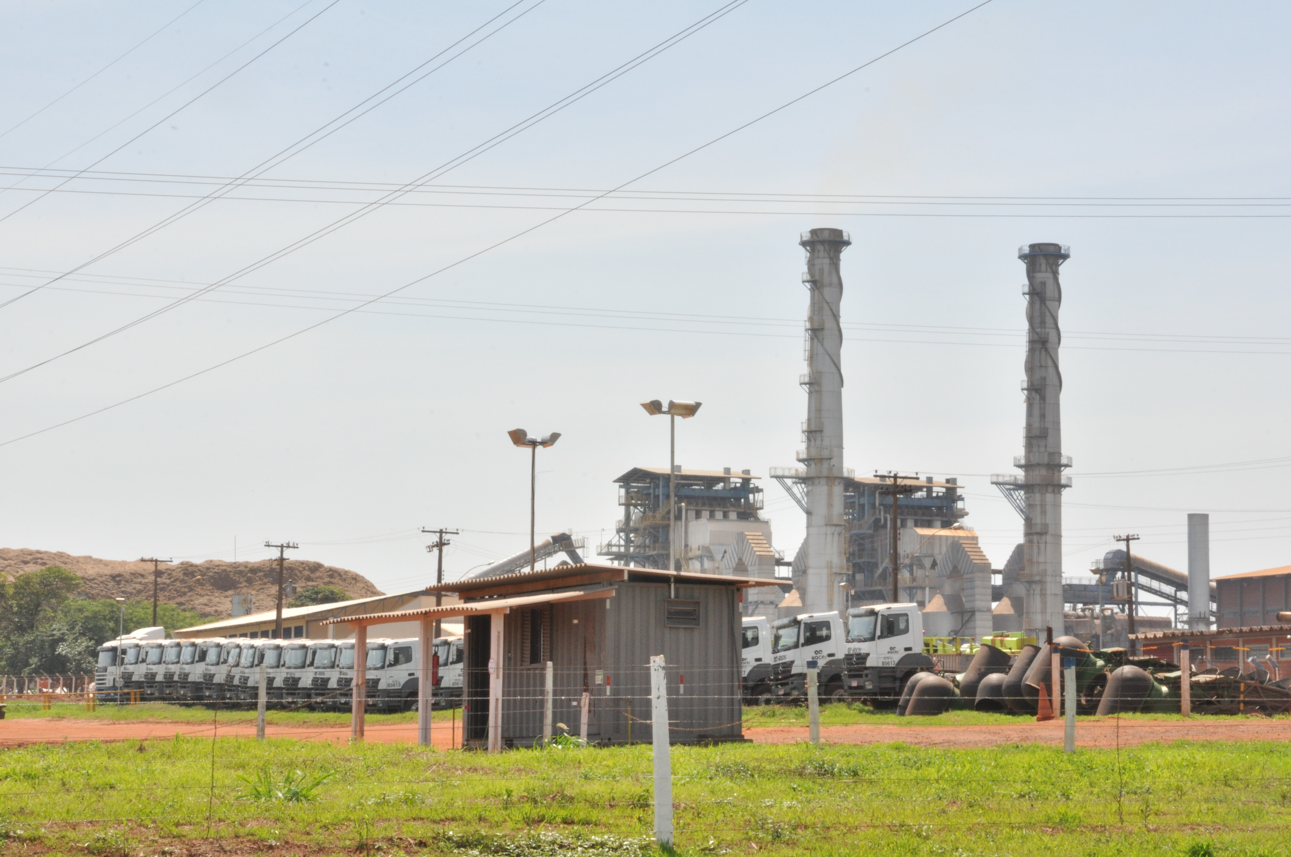 Usina de cana - entre safra